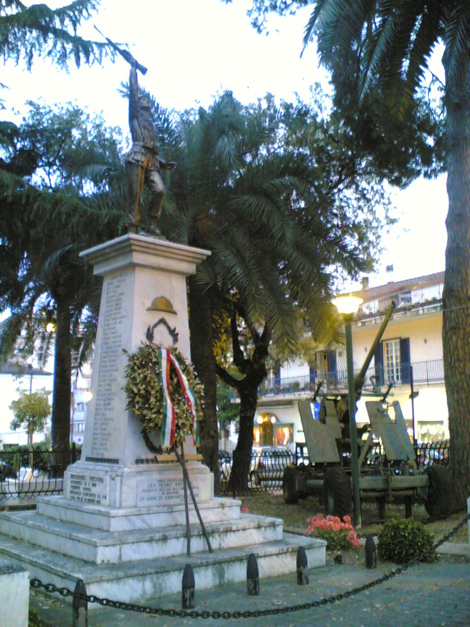 Carlo Iannuzzi, Opera Propria, Agropoli - Monumento ai Caduti, GFDL e Creative Commons CC-BY-SA tutte le versioni (3.0, 2.5, 2.0 e 1.0), sono l'autore